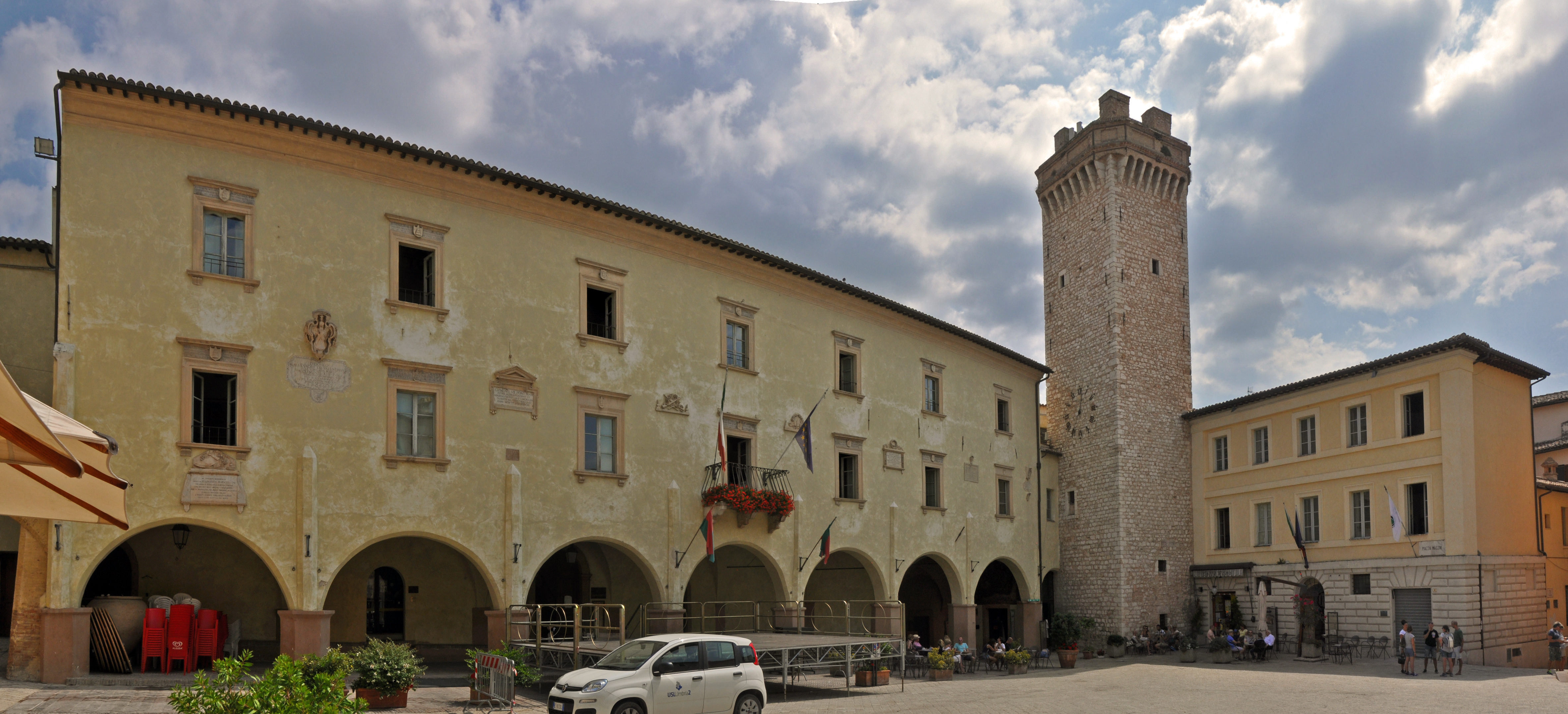 Piazza Mazzini (piazza del Comune) di Trevi (PG) - Agosto 2016